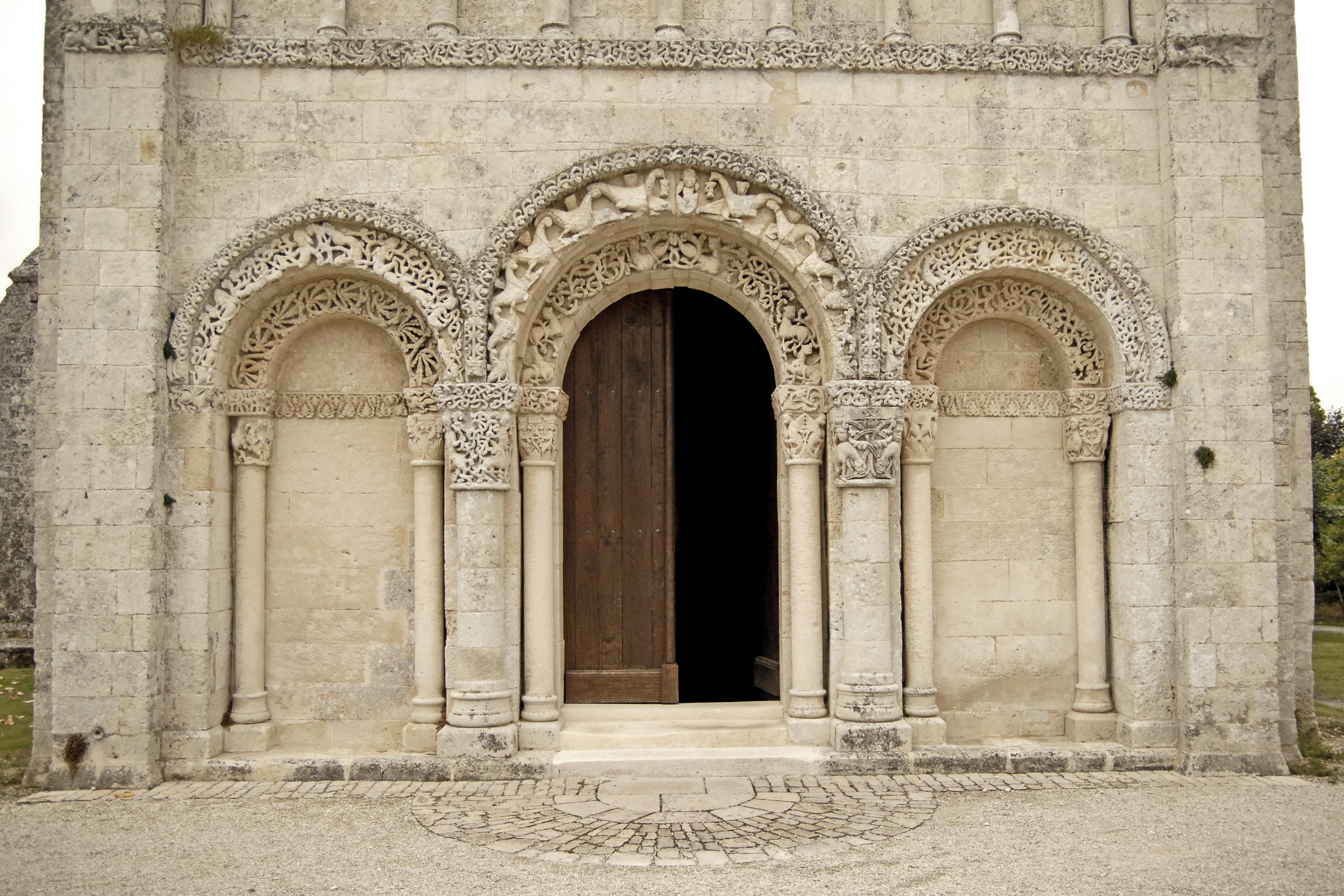 Notre-Dame Corme-Écluse,Fassade, Erdgeschoss